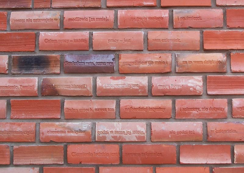 Biblioteka Świętego Pielgrzyma - pomnik Jana Pawła II i lapidarium kościoła św. Piotra w Głogowie, zbliżenie cegieł w ścianie południowej prezbiterium.